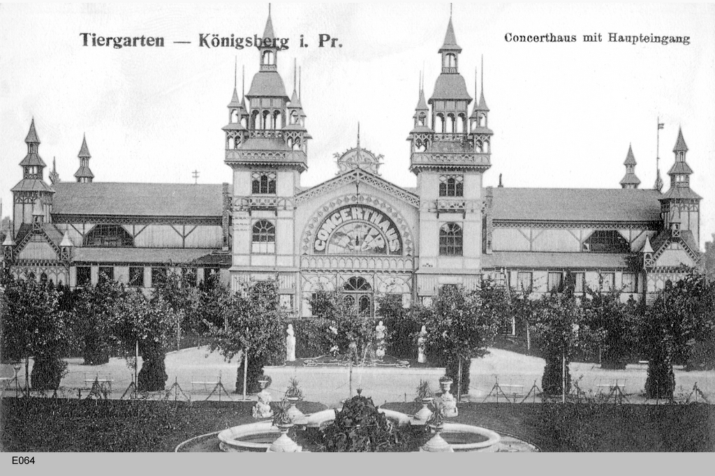 Königsberg